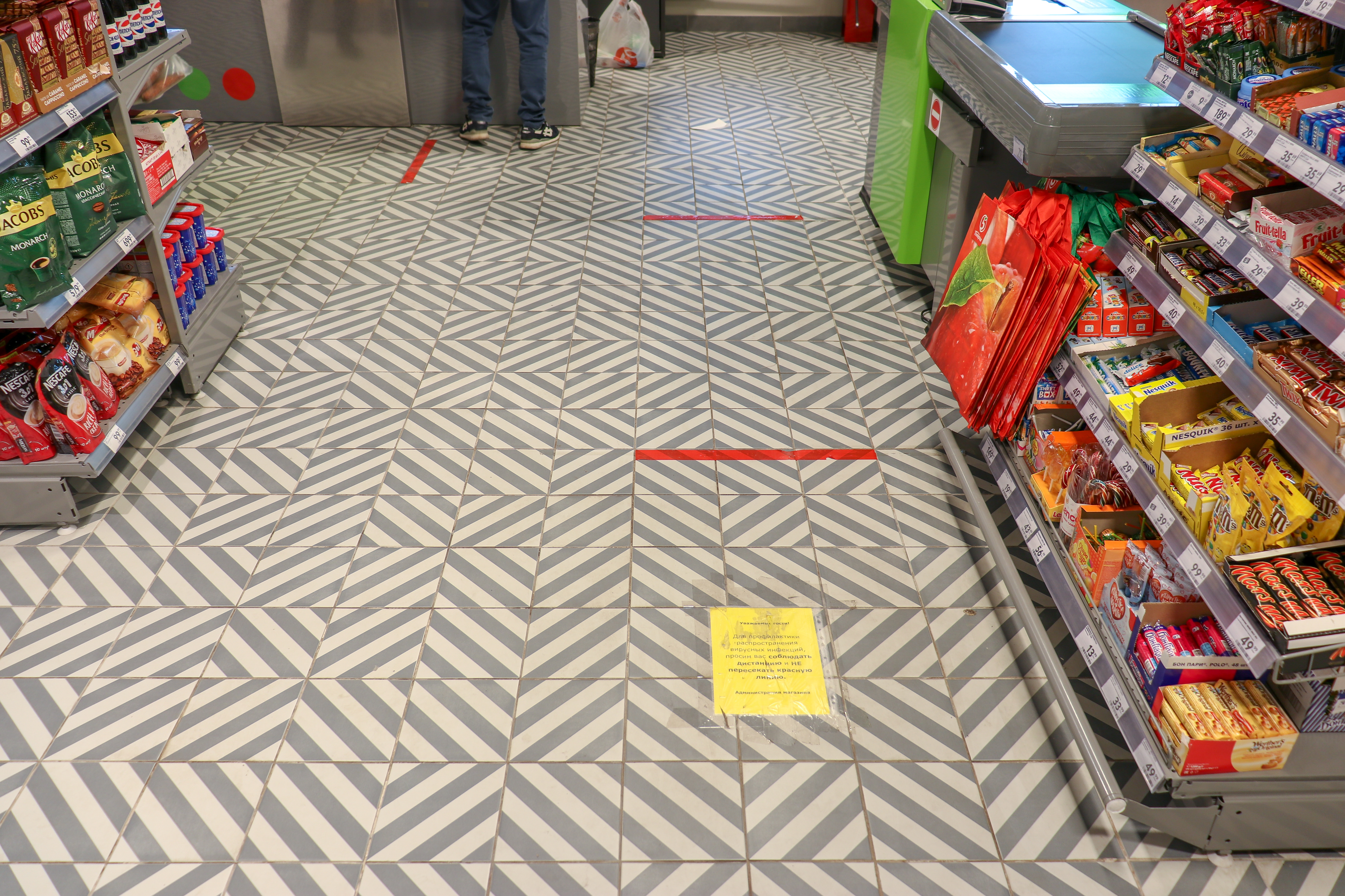 Разметка на полу (красные полосы) около касс в супермаркете Пятерочка в Москве в период пандемии COVID-19, указывающая дистанцию, которую должны соблюдать покупатели в очереди